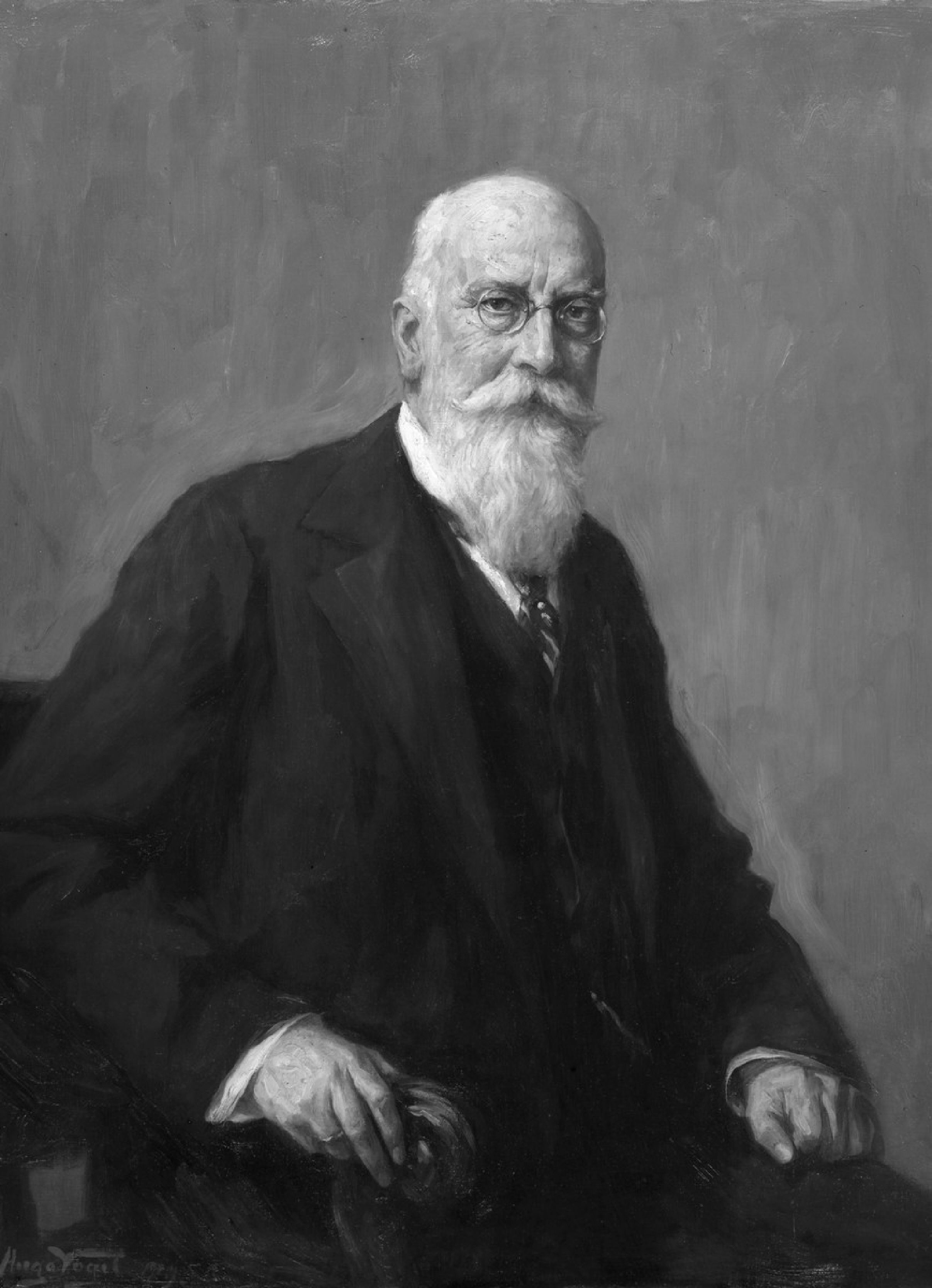 Hugo Vogel - Bildnis des Geheimrats Adolf Haeuser (* 26. November 1857 in Weilburg; † 13. März 1938 in Frankfurt am Main)